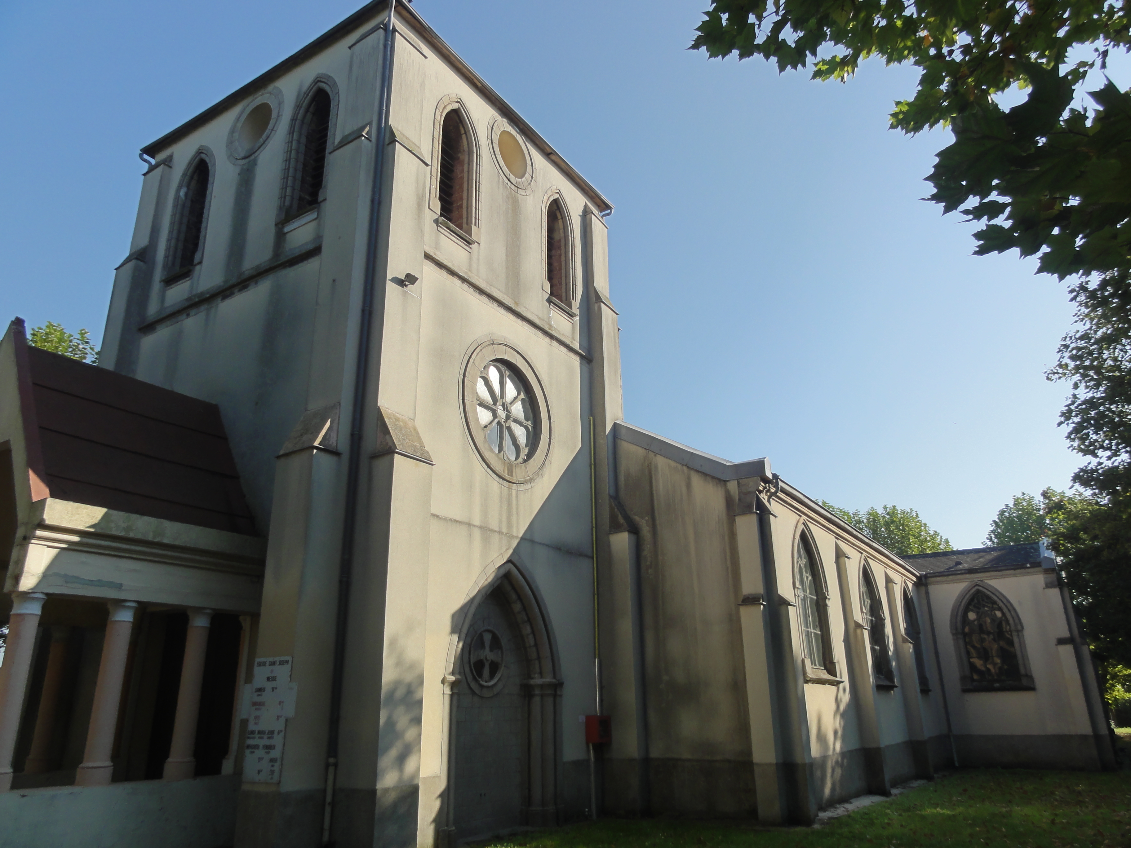 Église Saint-Joseph des cités de la Fosse n° 1 de la Compagnie des mines d'Ostricourt, Oignies, Pas-de-Calais, Nord-Pas-de-Calais, France.